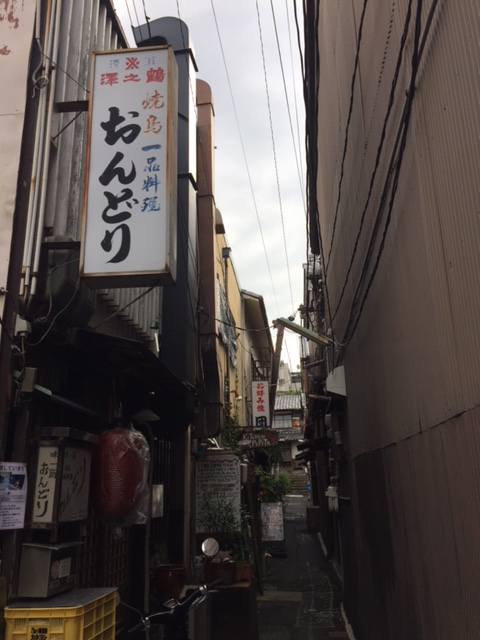 町内の古いお店たち